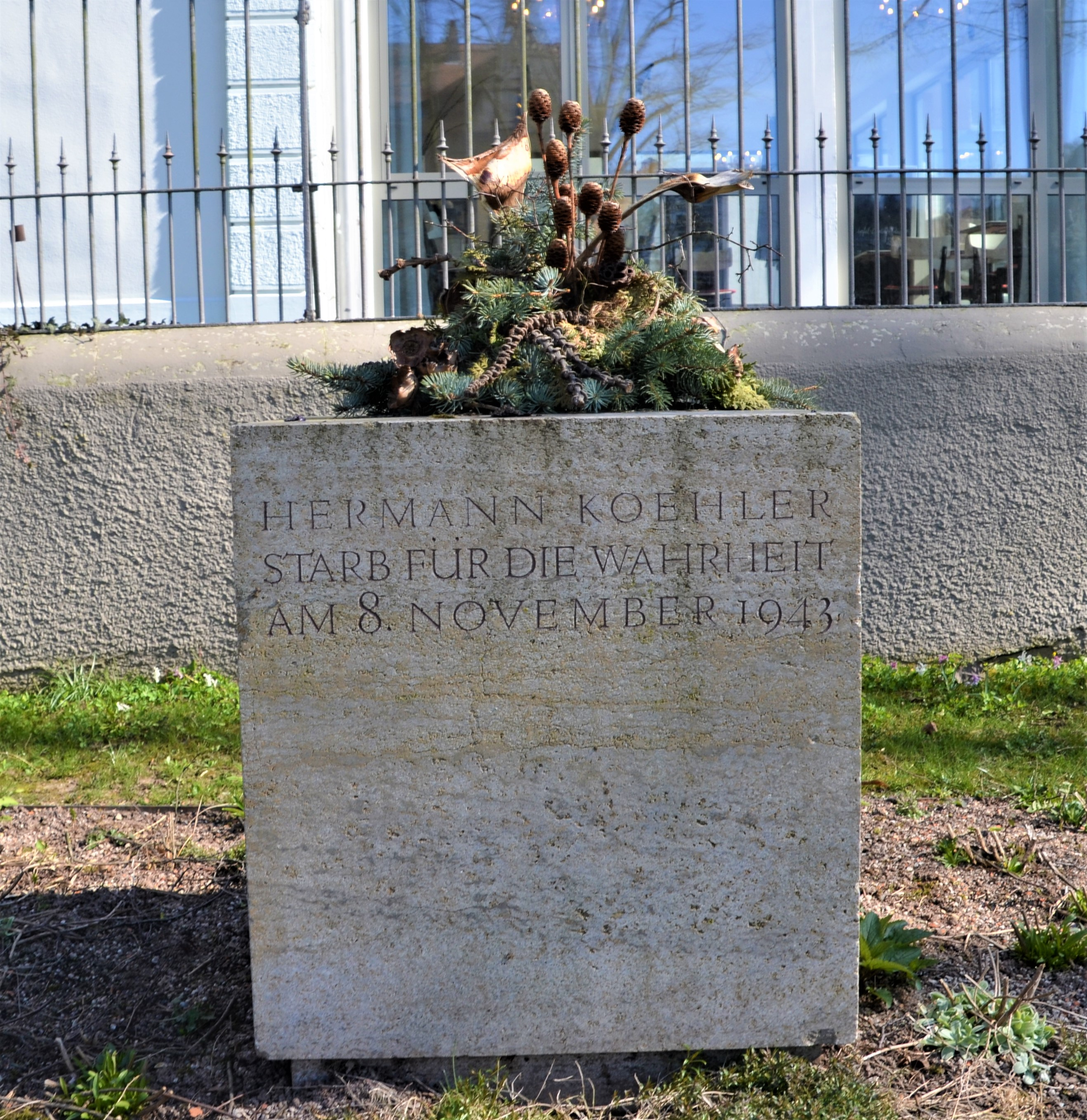 Denkmal für Hermann Koehler (* 8. Oktober 1876 in Schwäbisch Gmünd; † 8. November 1943 im Zuchthaus Brandenburg) in der Hermann-Koehler-Anlage Gmünd